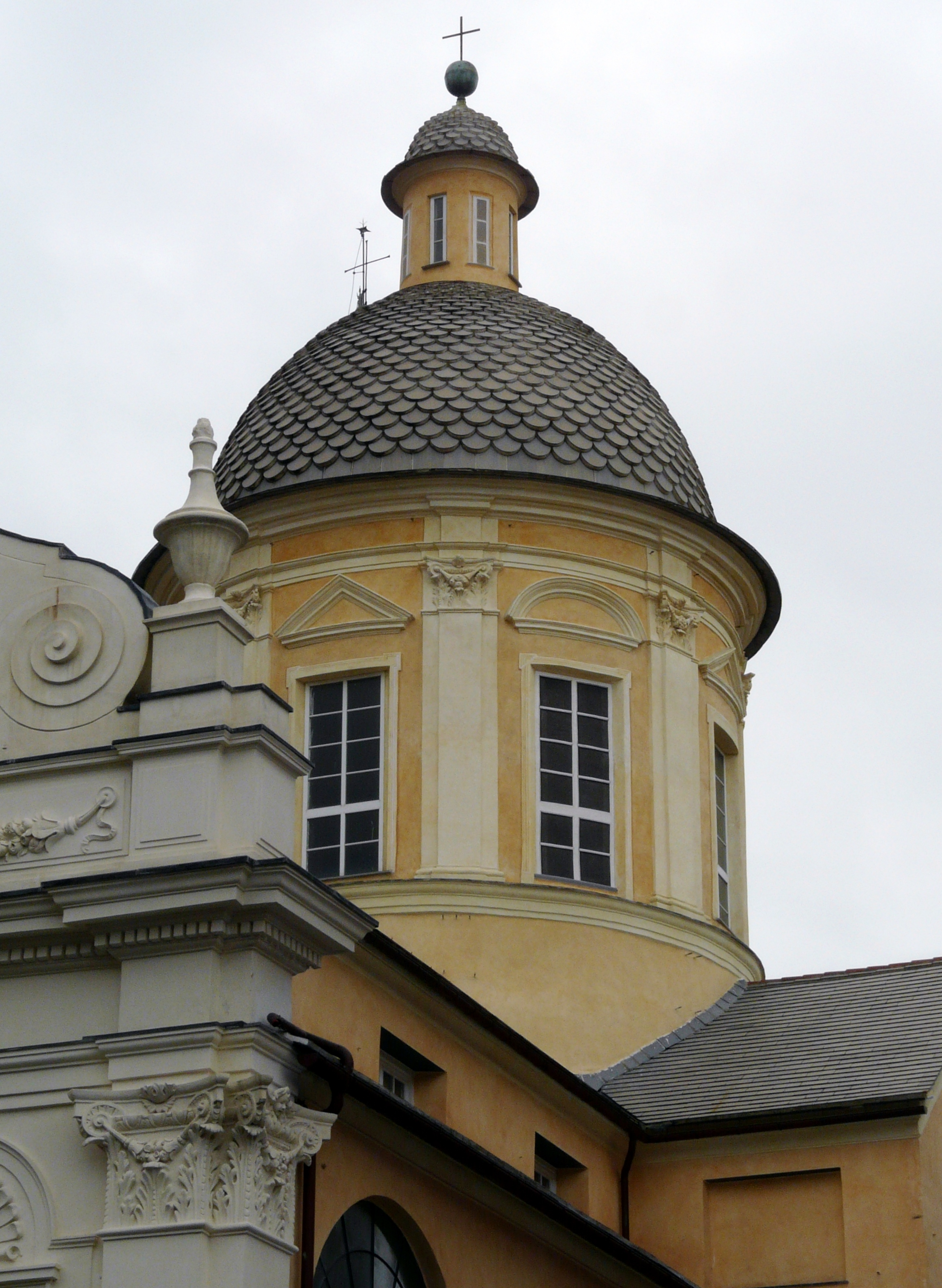 Cupola dell'ex chiesa di San Francesco, oggi auditorium, a Chiavari, Liguria, Italia